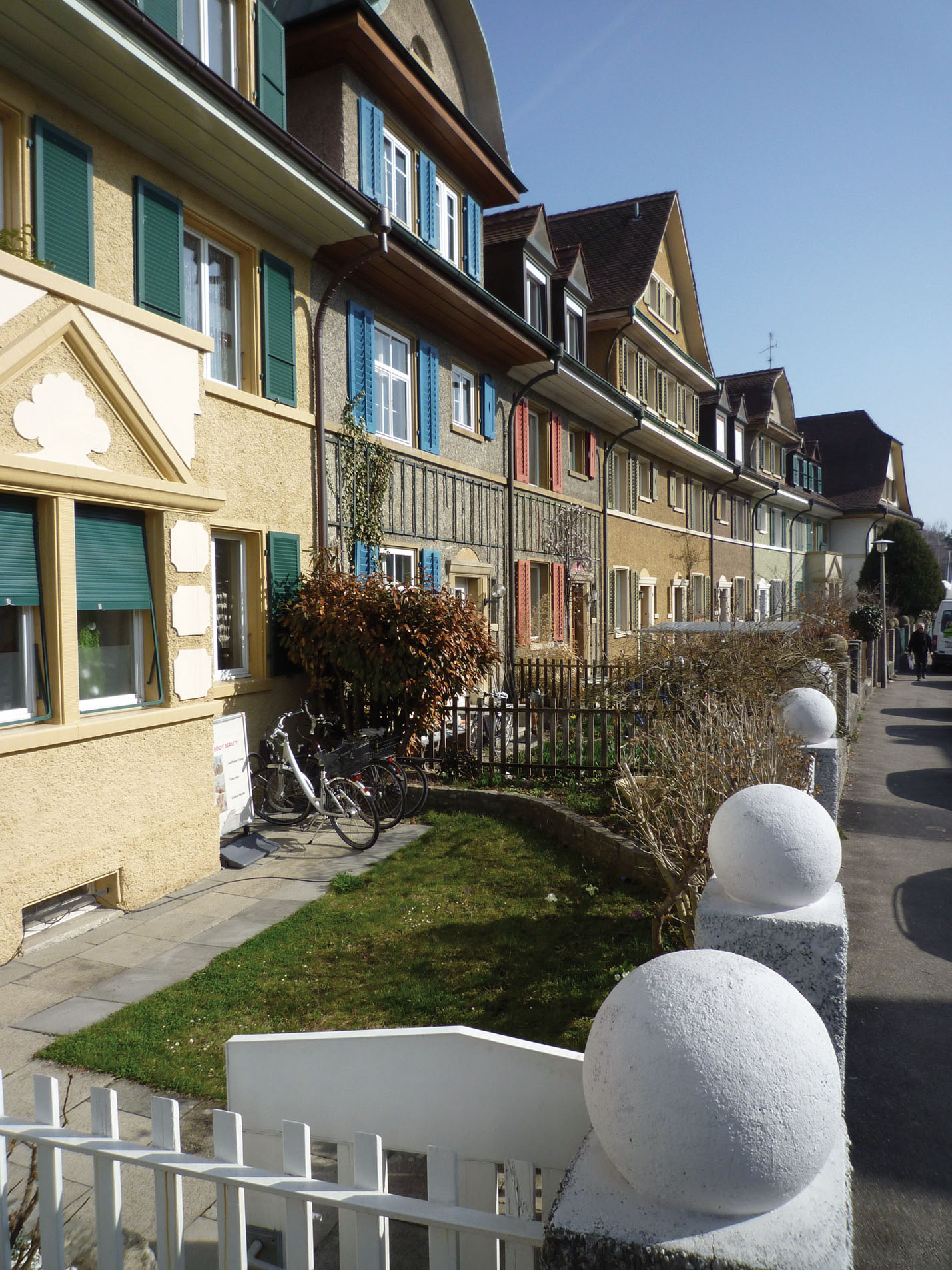 Wohnhäuser der Gartenstadt Münchenstein (Schweiz, Kanton Basel-Landschaft), 1912 erbaut nach Plänen des Architekten Emil Dettwiler.